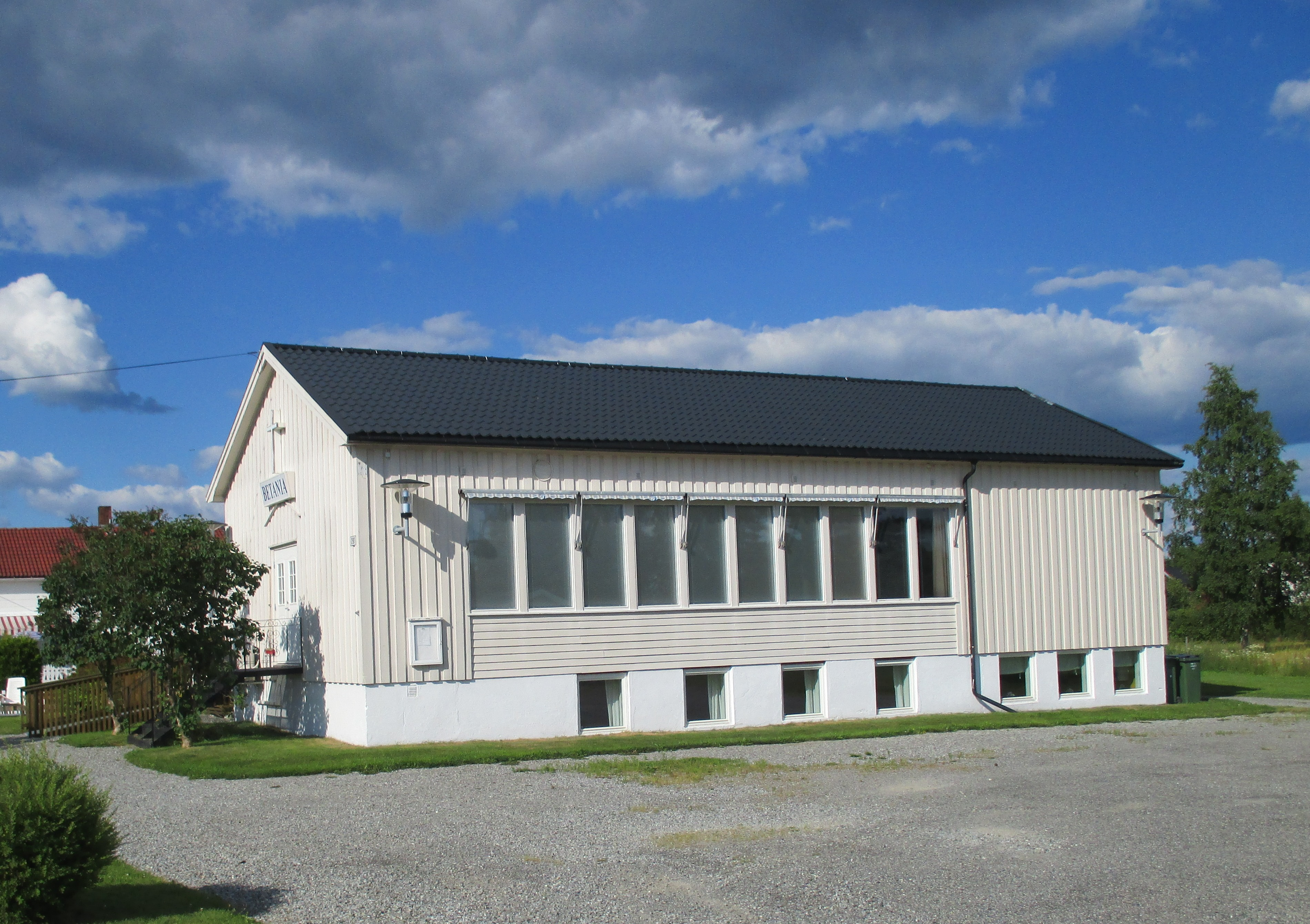 Betania Bjerke, pinsemenighet i Nannestad